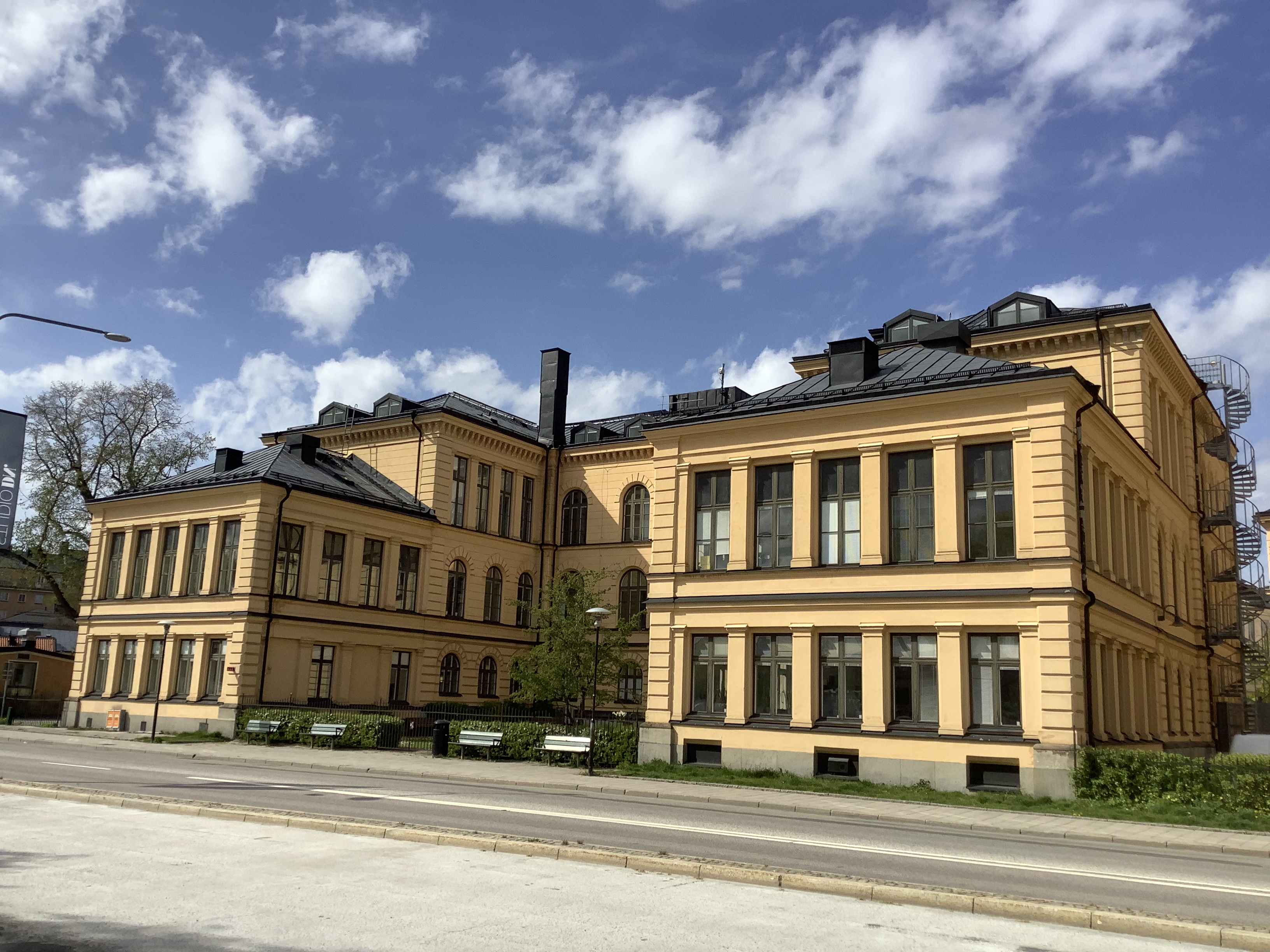 Gamla Karolinska Institutet, Kungsholmen, Glasbruket 3, hus 2, 1866, arkitekt Johan Erik Söderlund